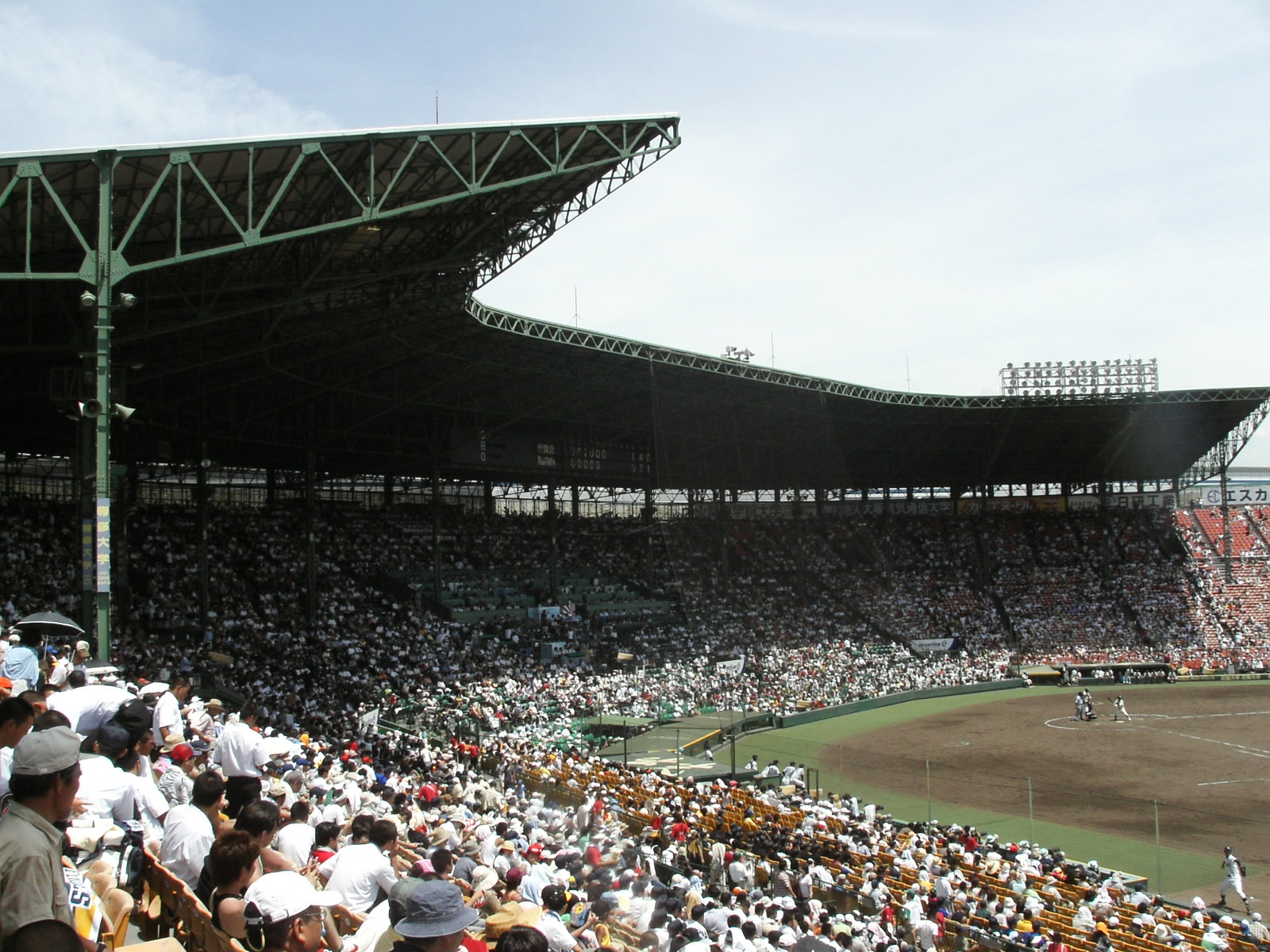 Hanshin Koshien Stadium